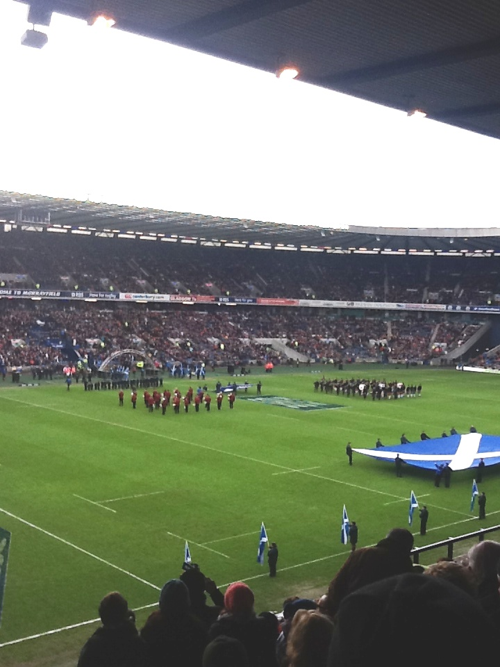 Murrayfield Rugby